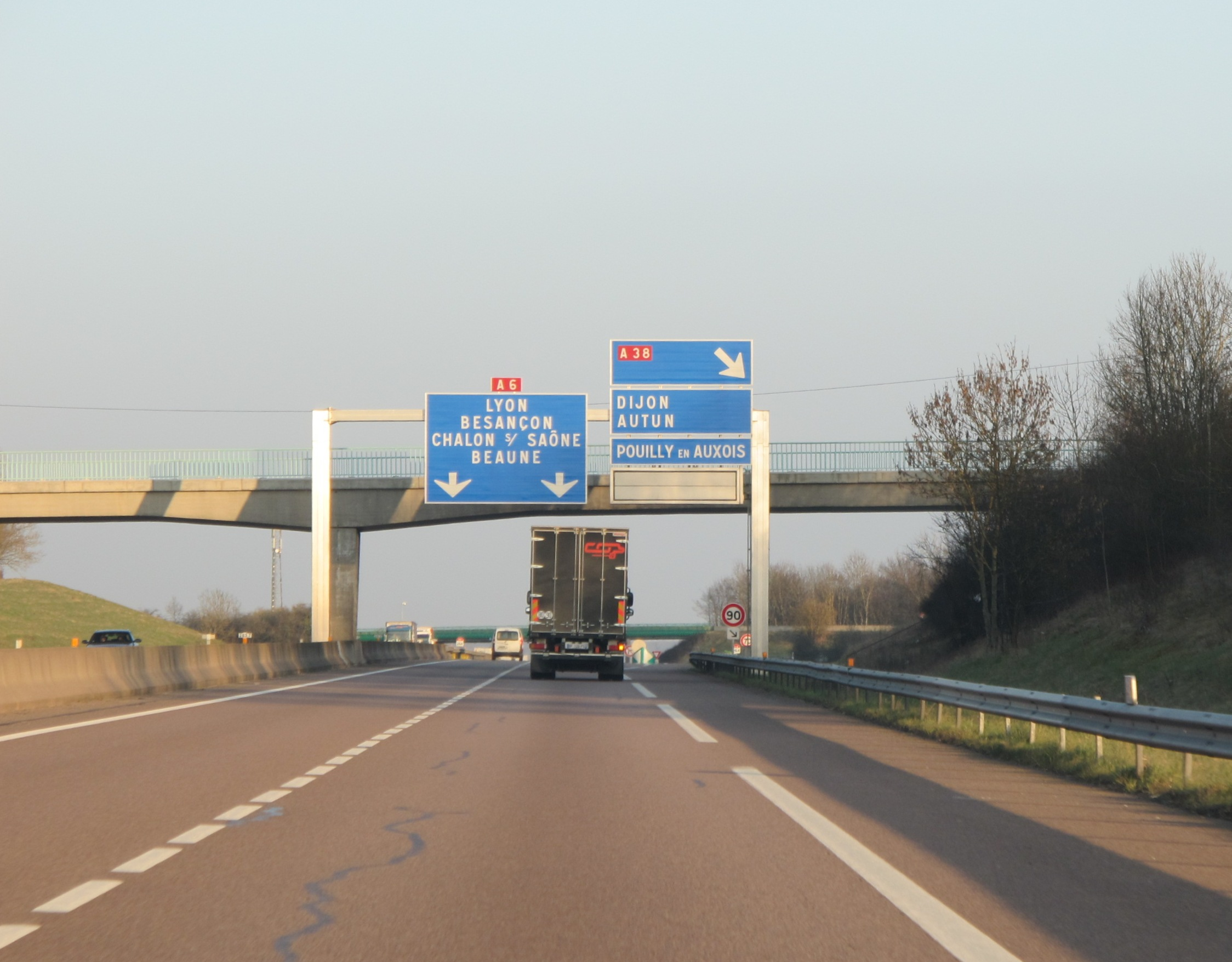 Autoroute A6 - France